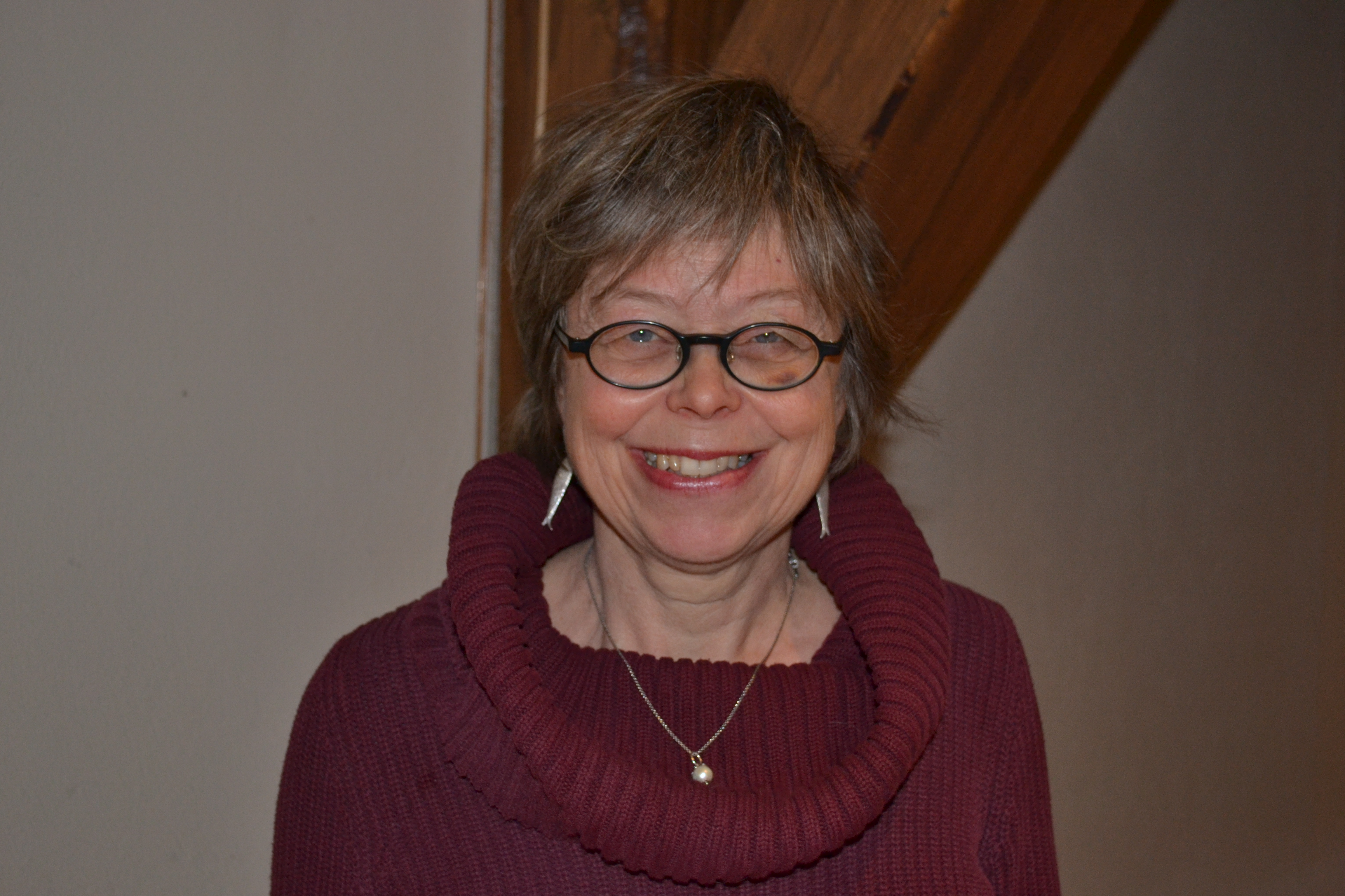 Museichef/intendent Lena Alebo